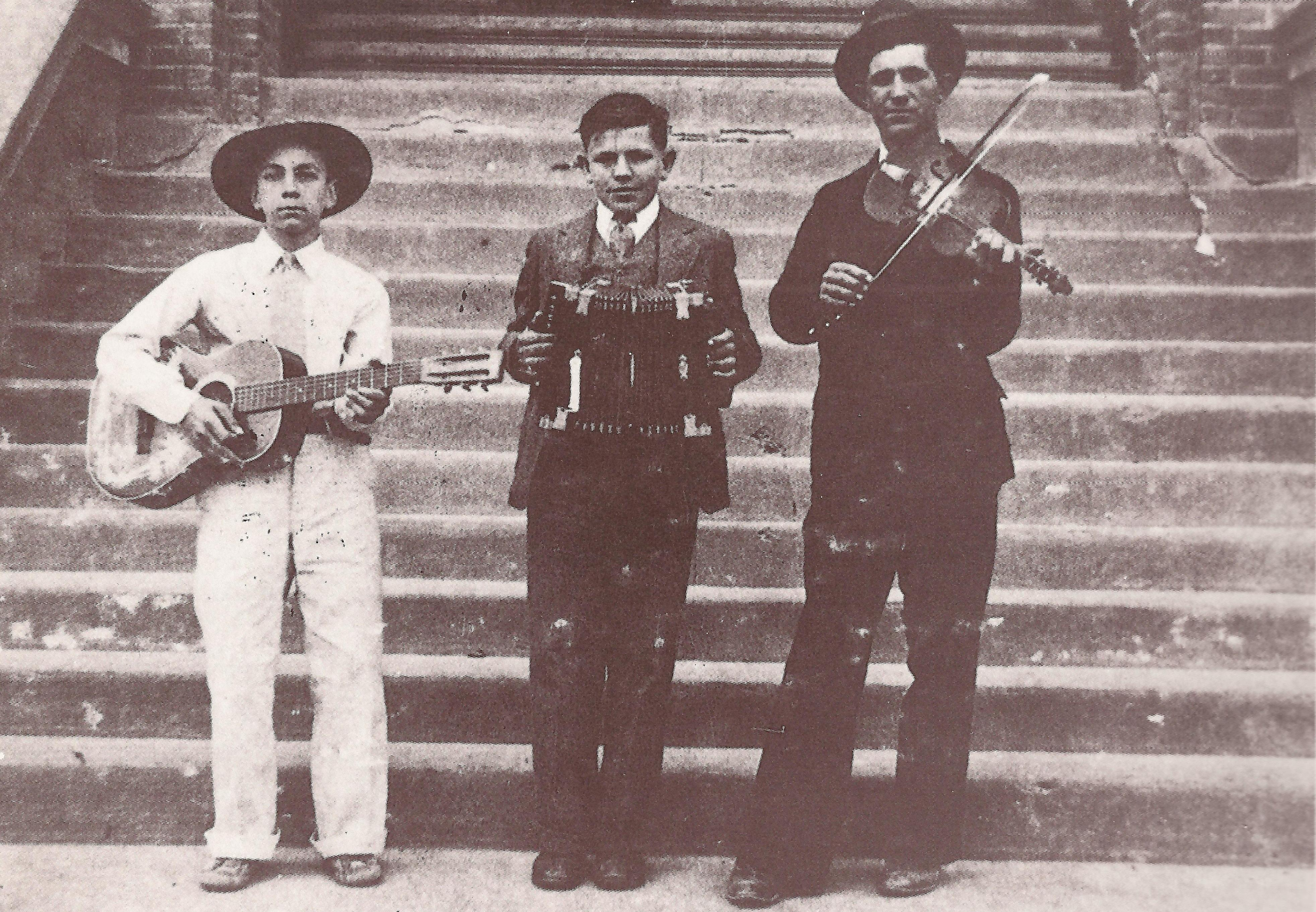 Ophey Breaux, Amede Breaux, Aldus "Popeye" Broussard